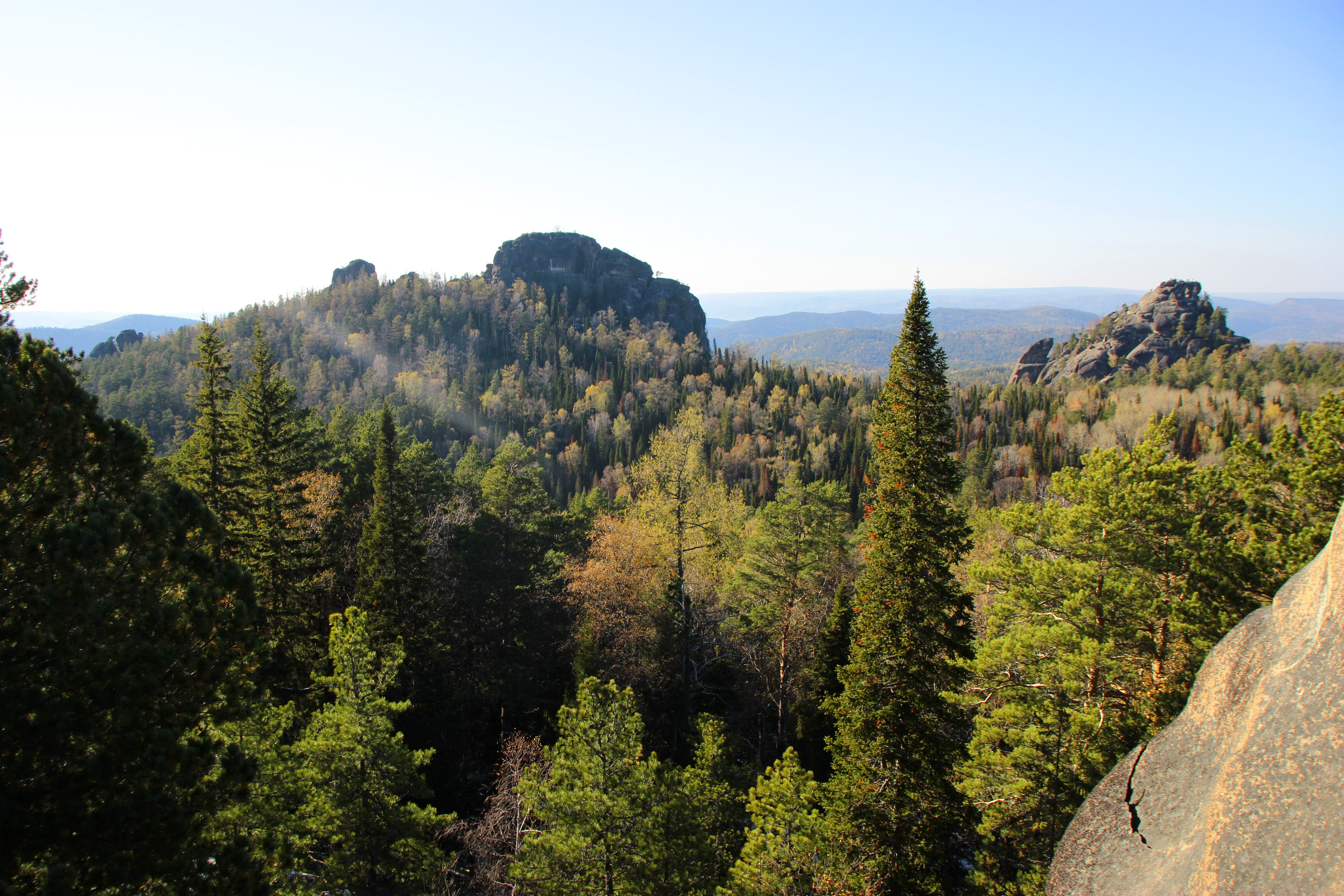 Всех, пришедших на Центральные Столбы, встречают Второй и Первый столбы. Гряда Второго столба, возвышающегося как вынырнувший кит, уходит влево целой чередой небольших скалок таких как видимые здесь Митра и Рукавички. Зато Первый, более компактный имеет большее количество ходов и ходы эти есть как для новичков, так и очень опытных скалолазов. Вид с Четвёртого столба. This image is related to the protected area of Russia number 2400031